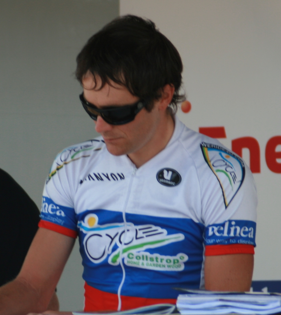 Borut Bozic, à l'Eneco Tour 2008, à Ardooie